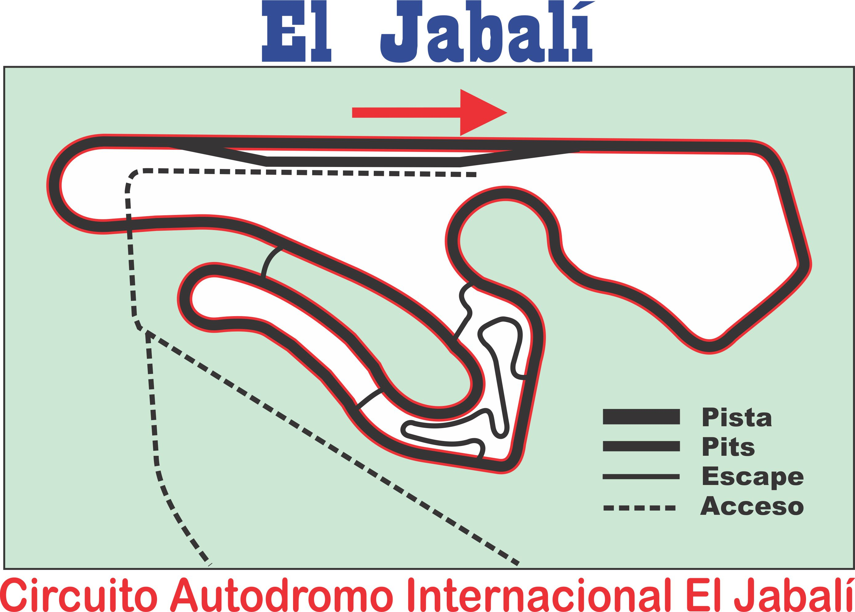 Autodromo